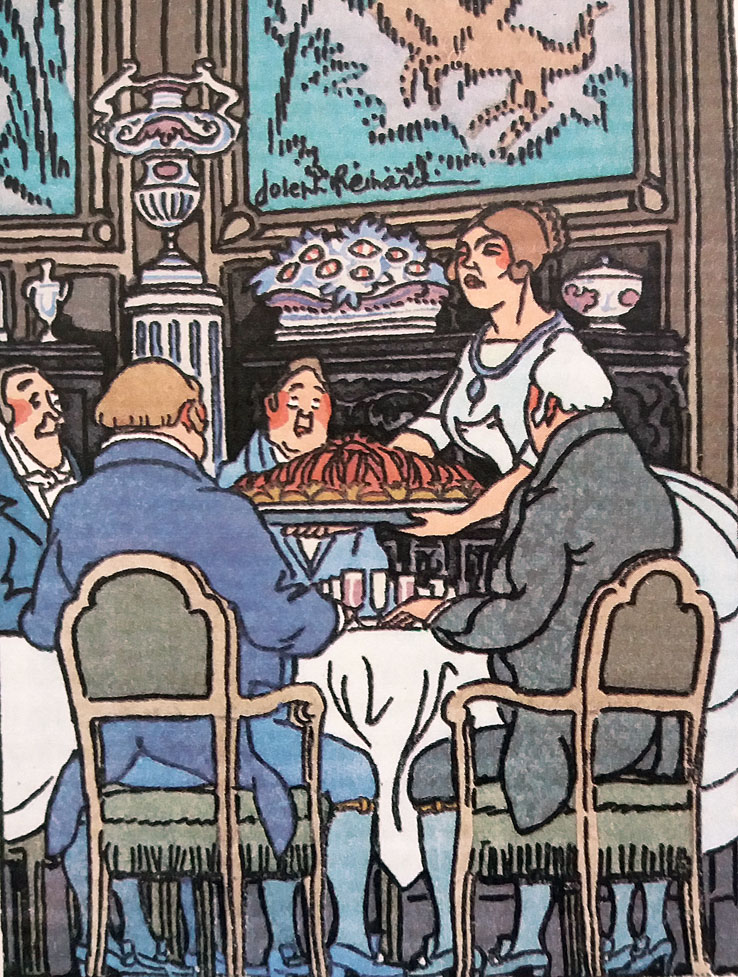 Adèle Pidou sert la fameux pot au feu Dodin Bouffant